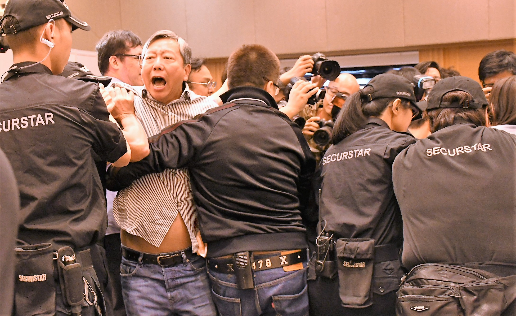 李卓人被多名保安人員粗暴驅逐離場。(美國之音湯惠芸)